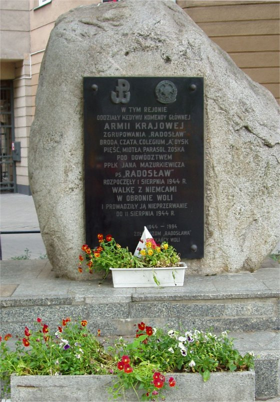 Przy ul. Okopowej (blisko skrzyżowania z Mireckiego) w Warszawie (fot Zu)